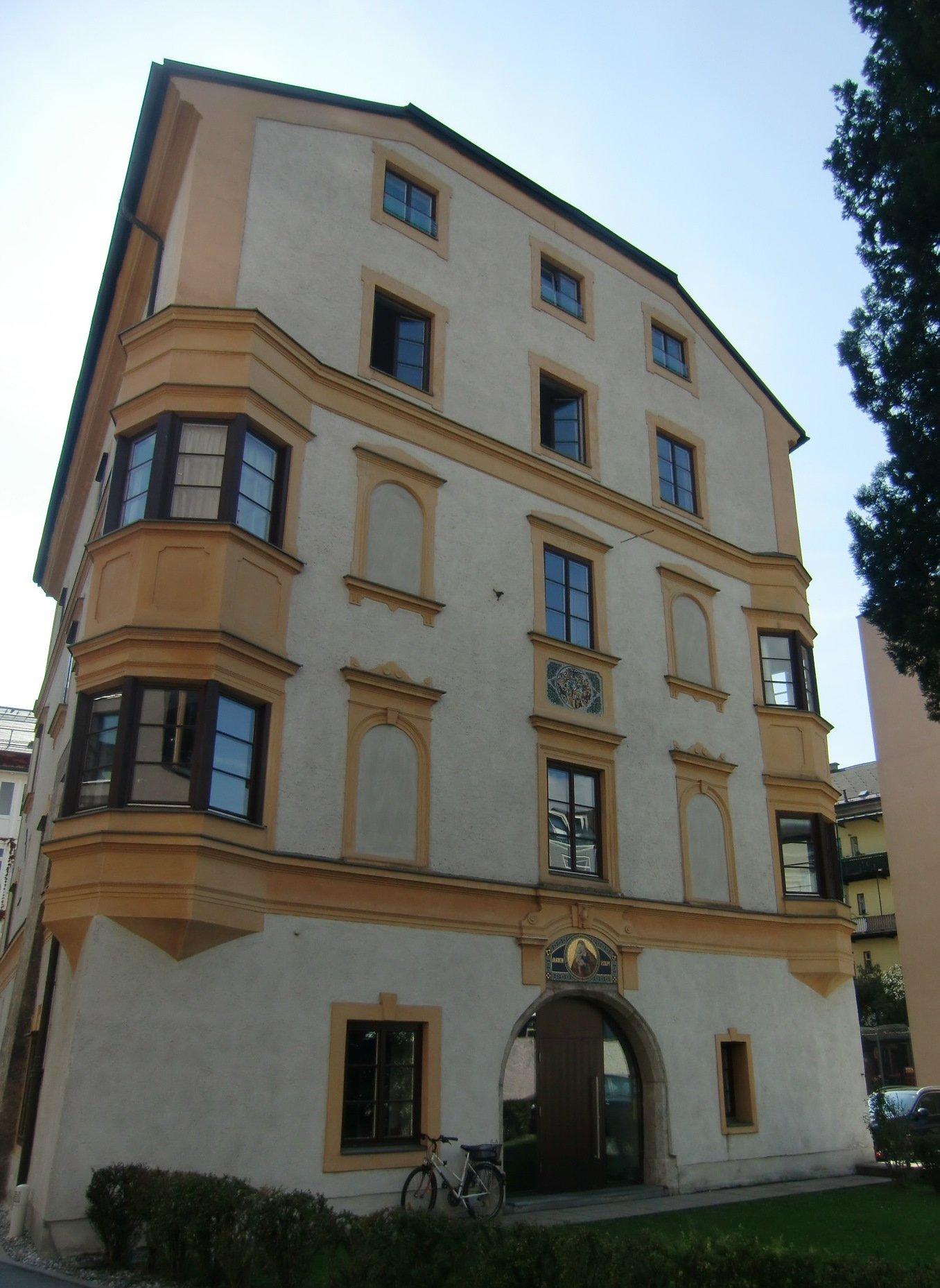 Albersheim/Notburgaheim, Innrain 41, Innsbruck